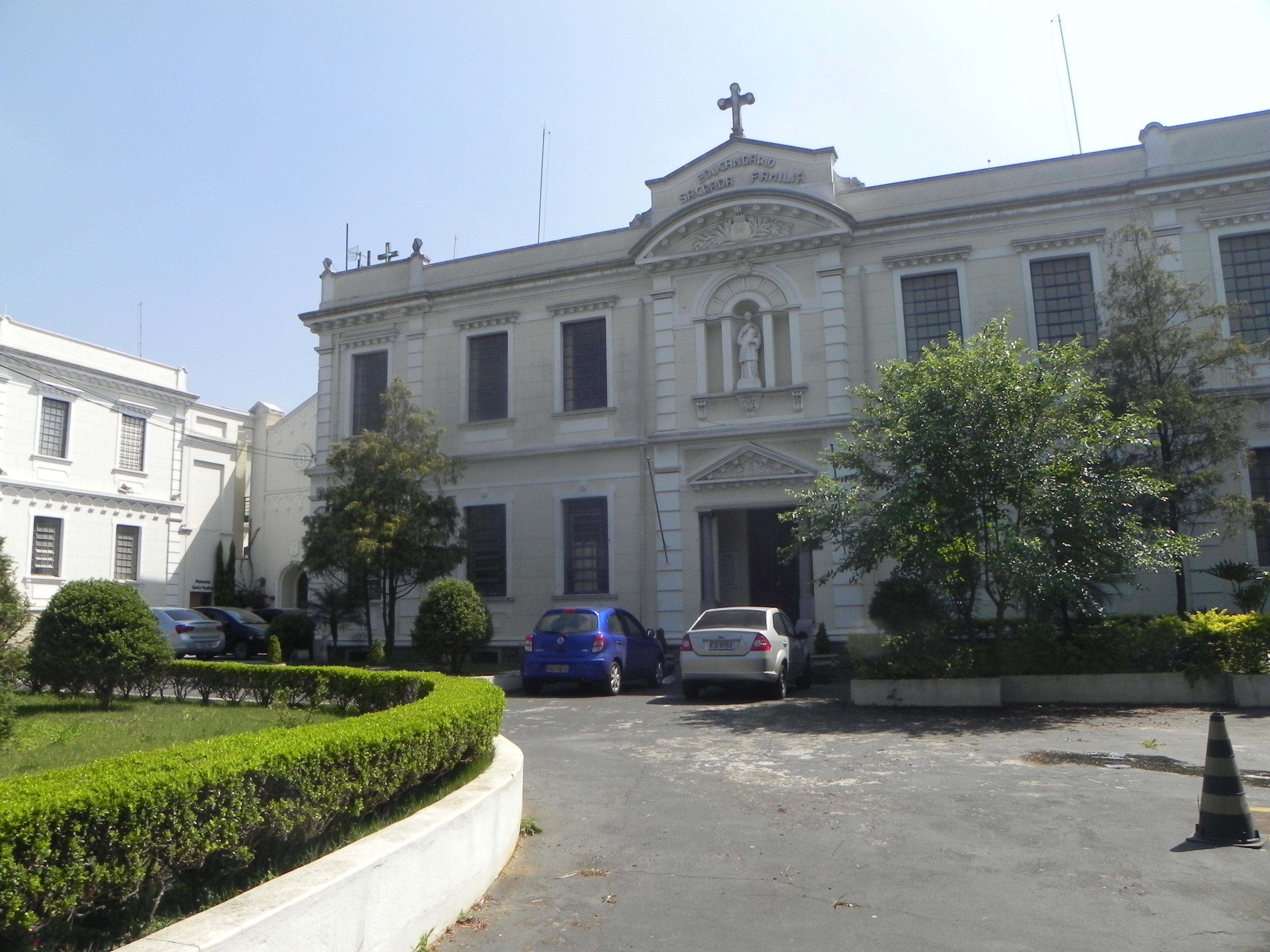 Vista lateral do Educandário Sagrada Família